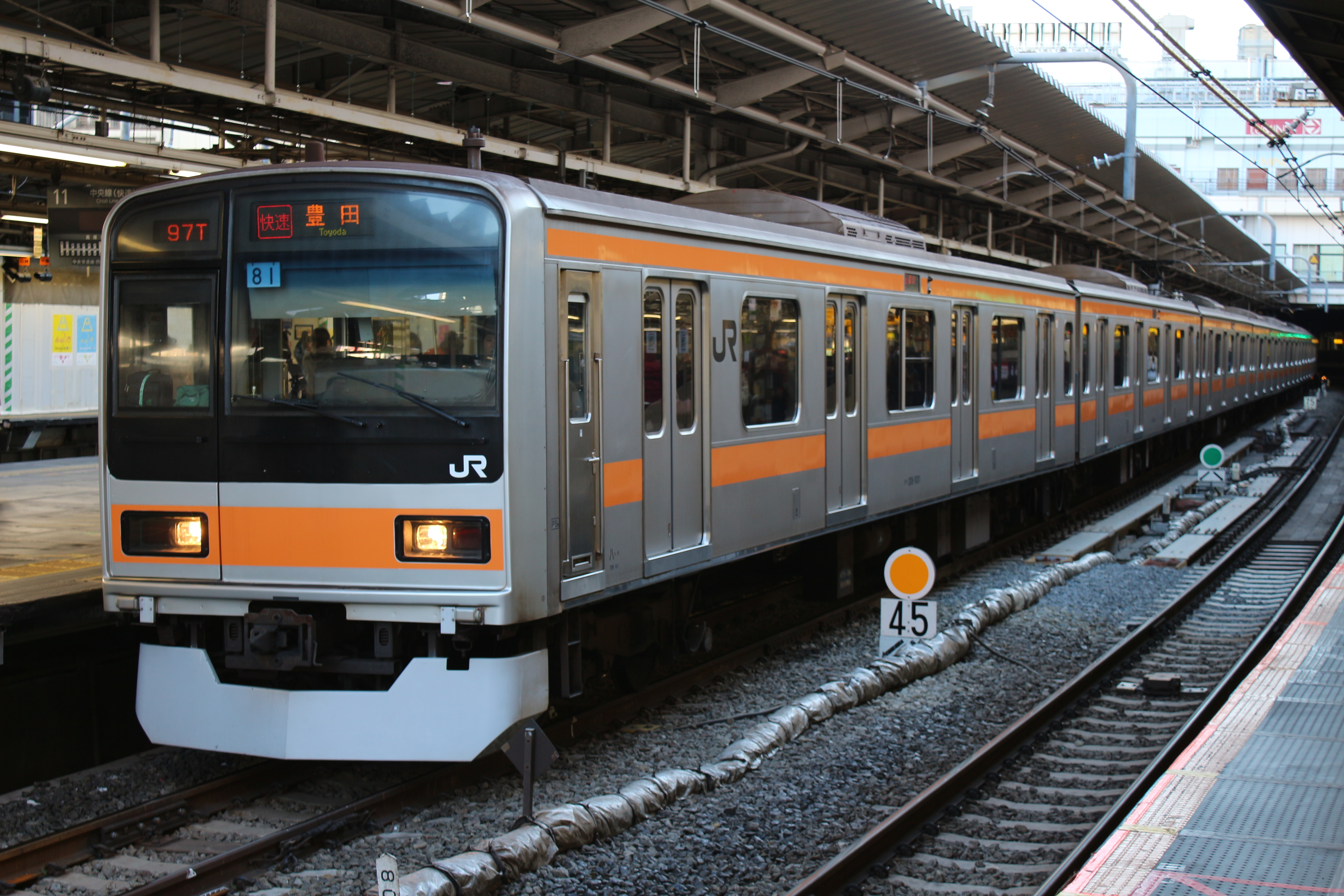 209系1000番台 中央快速線 新宿駅